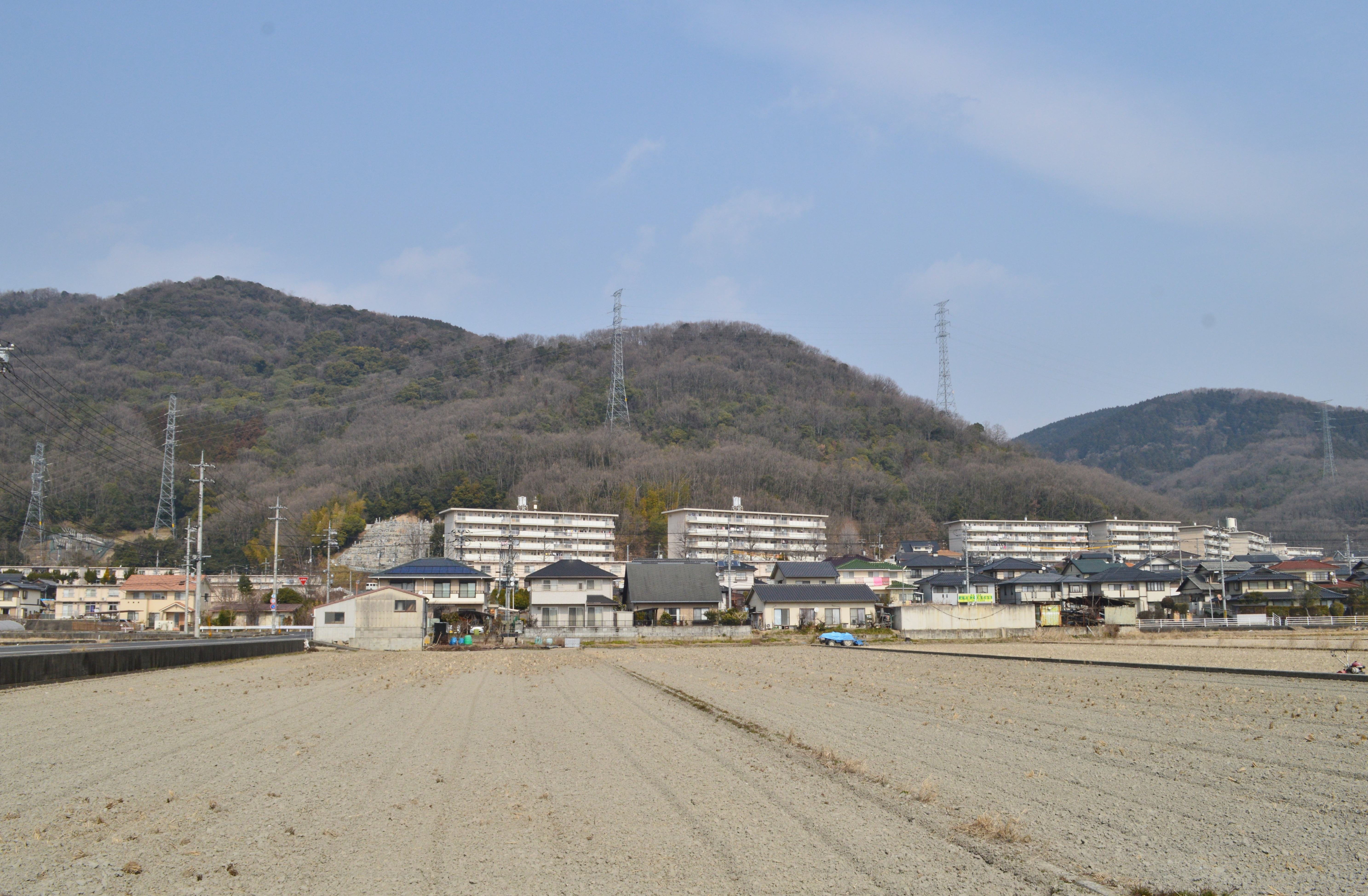 備前車塚古墳の所在する丘陵遠景